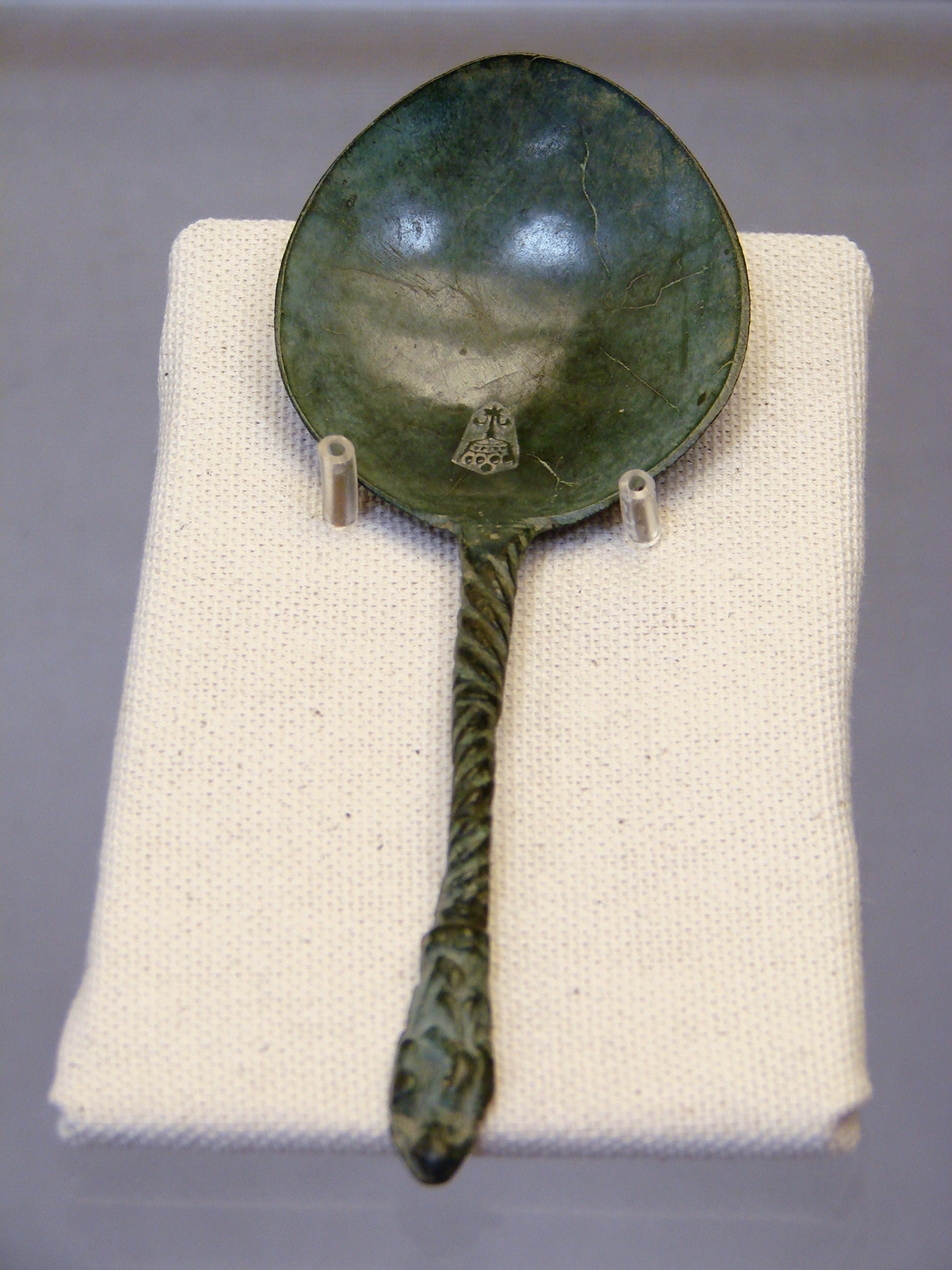 Cuillère en bronze, époque médiévale, provenant de l'abbaye de Vauclair. Musée de Laon.